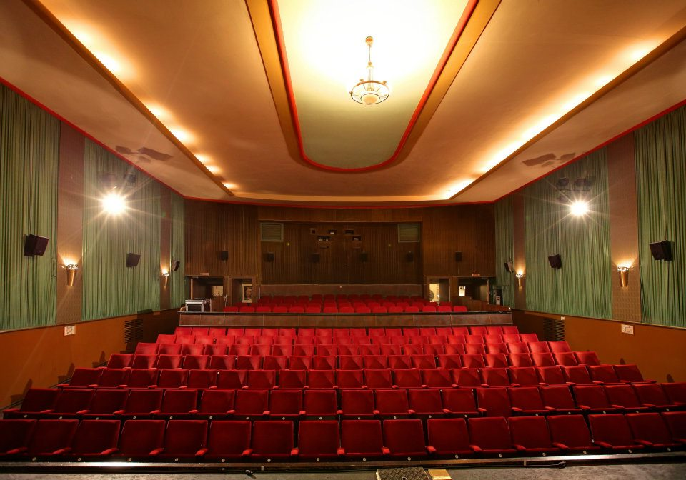 Saal von der Bühne aus